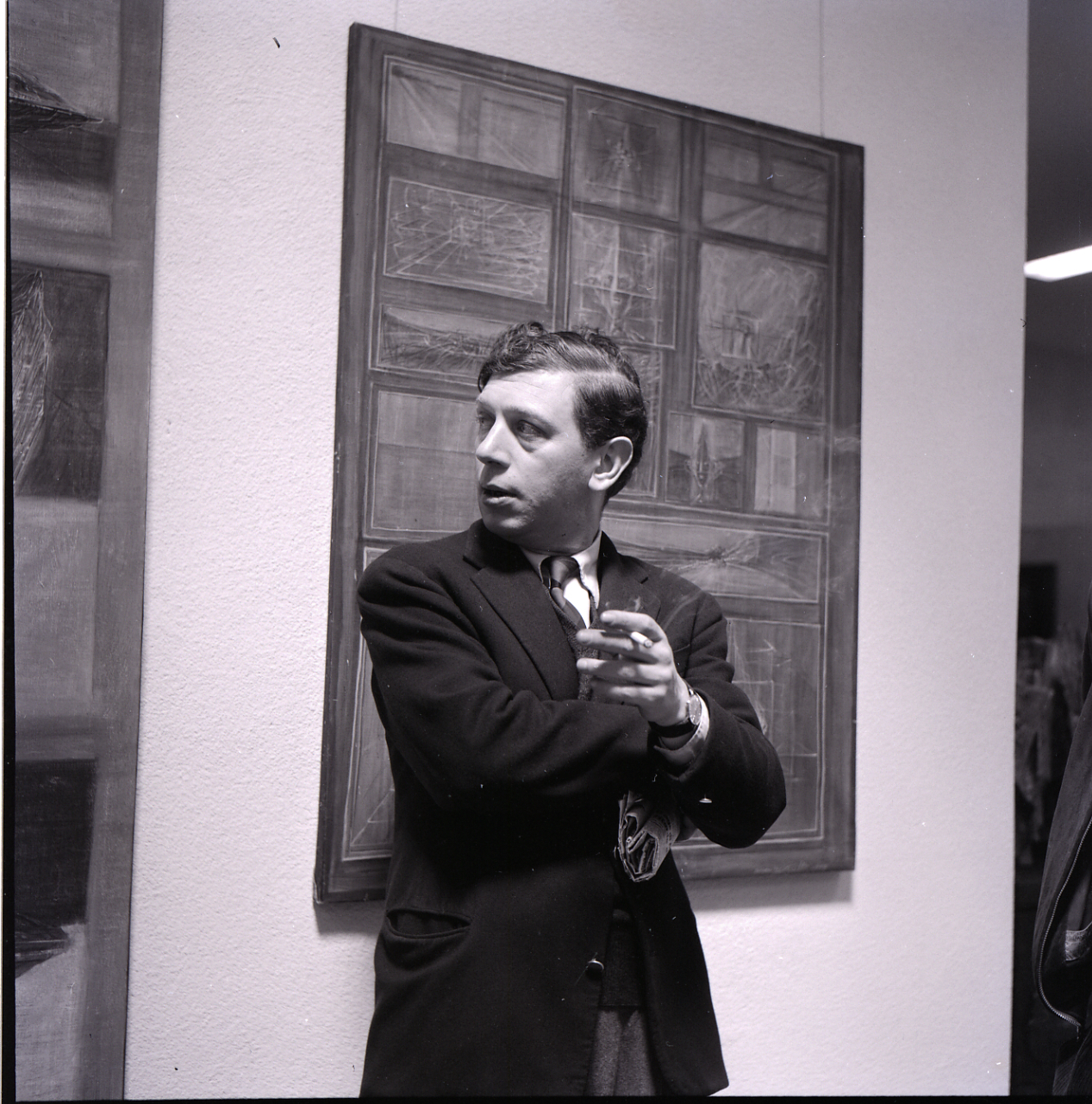 Servizio fotografico : Italia, 1982 / Paolo Monti. - Buste: 2, Fototipi: 2 : Negativo b/n, gelatina bromuro d'argento/ pellicola ; 6x6. - ((Serie costituita da 2 buste di carta, tenute insieme da una graffetta, identificate con i nn.: R4461, R4462. - Sulla busta R4461: "Peverelli"